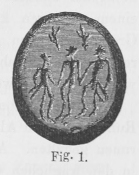 „Gemme von Alsen“ (Alsengemme), gefunden 1871 in Sønderborg auf Als (dt.: Alsen), Glas, 28×24×5 mm.